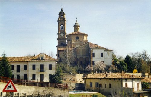 Visuale Piovà